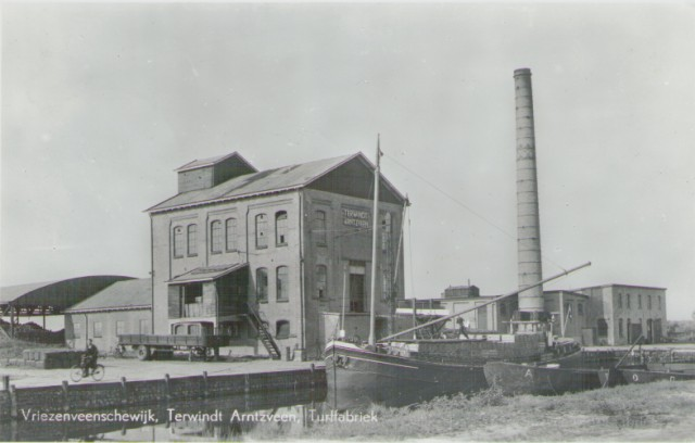 Turffabriek Terwindt Arntzveen Vriezenveenschewijk